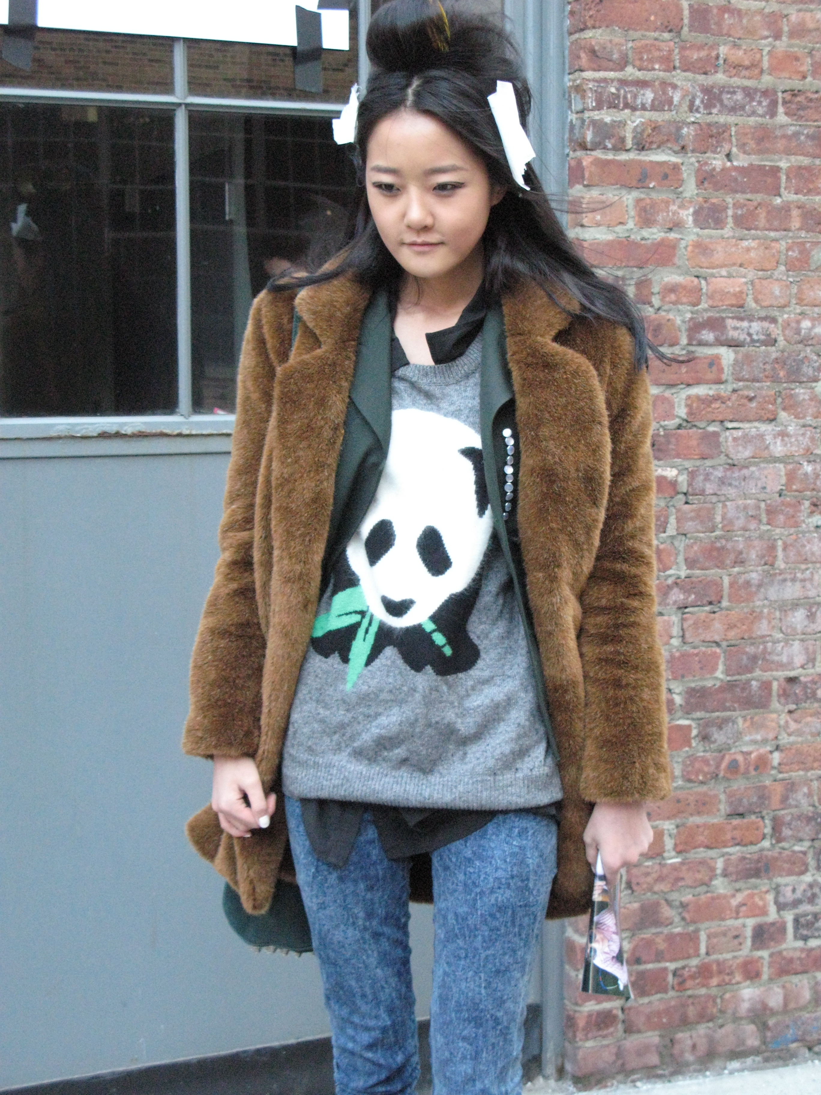 Hyoni Kang at DKNY